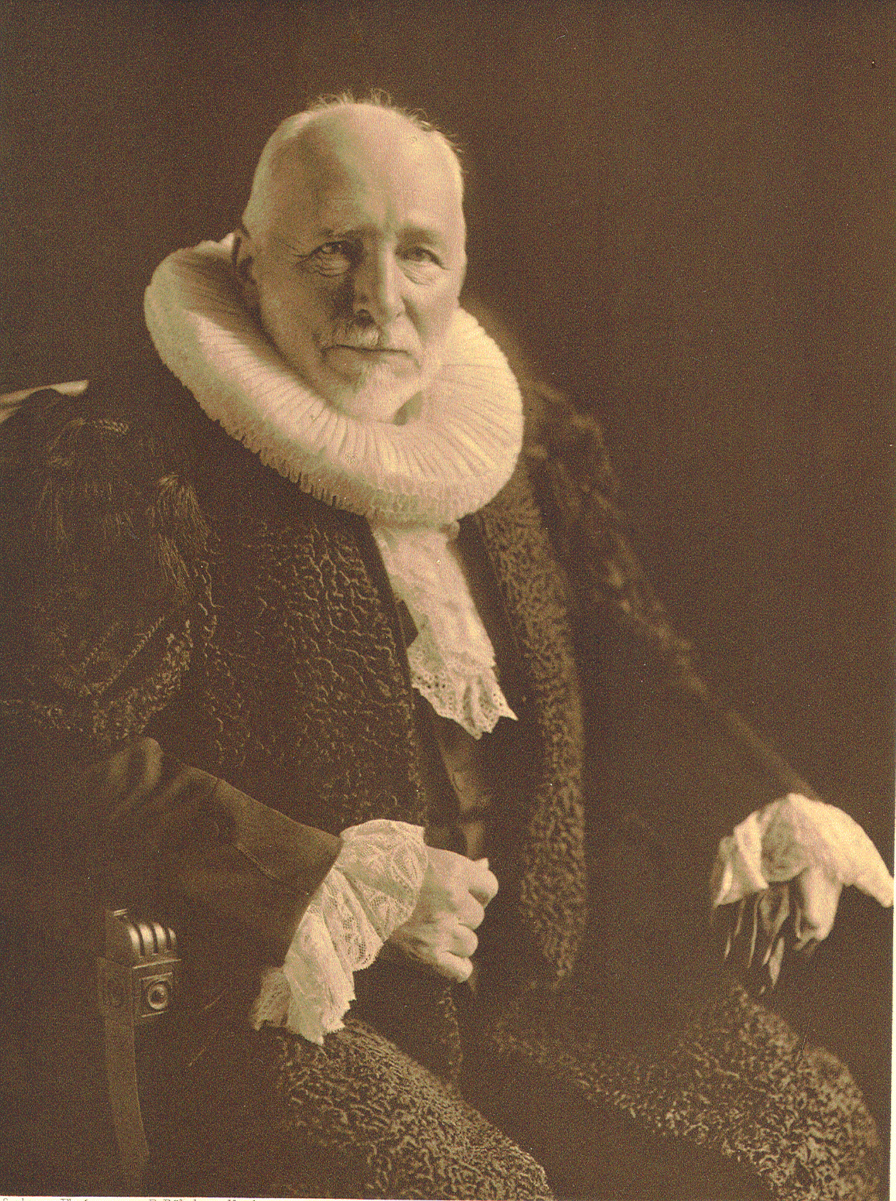 Johann Otto Stammann (1835–1909), Hamburger Bürgermeister 1906-1907